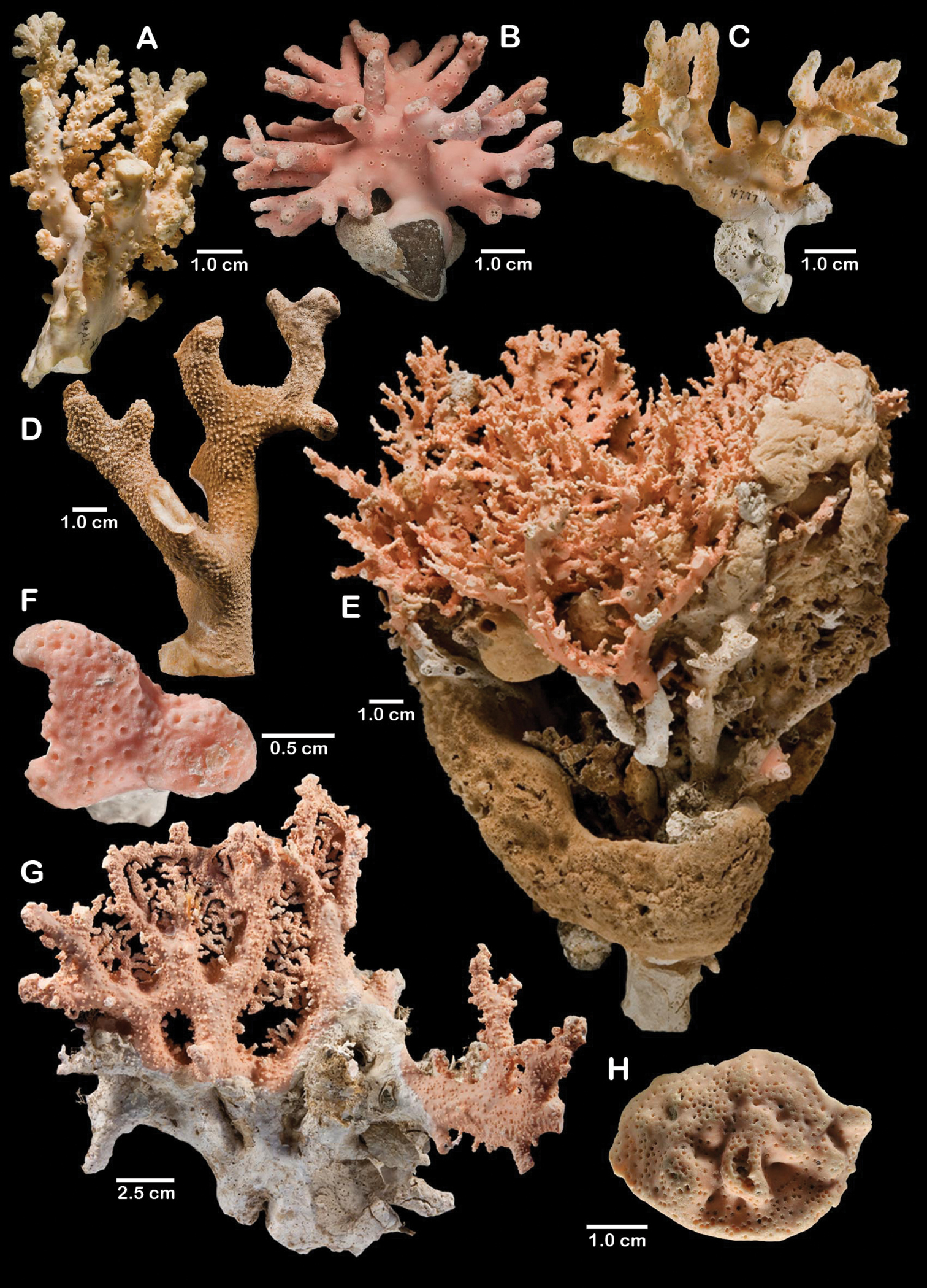 Stylasteridae de Alaska. A, E, G: Stylaster brochi, B, F, H: Stylaster verrillii, C: Stylaster stejnegeri, D: Errinopora dichotoma. Cairns S, Lindner A (2011) A Revision of the Stylasteridae (Cnidaria, Hydrozoa, Filifera) from Alaska and Adjacent Waters. ZooKeys 158: 1-88.